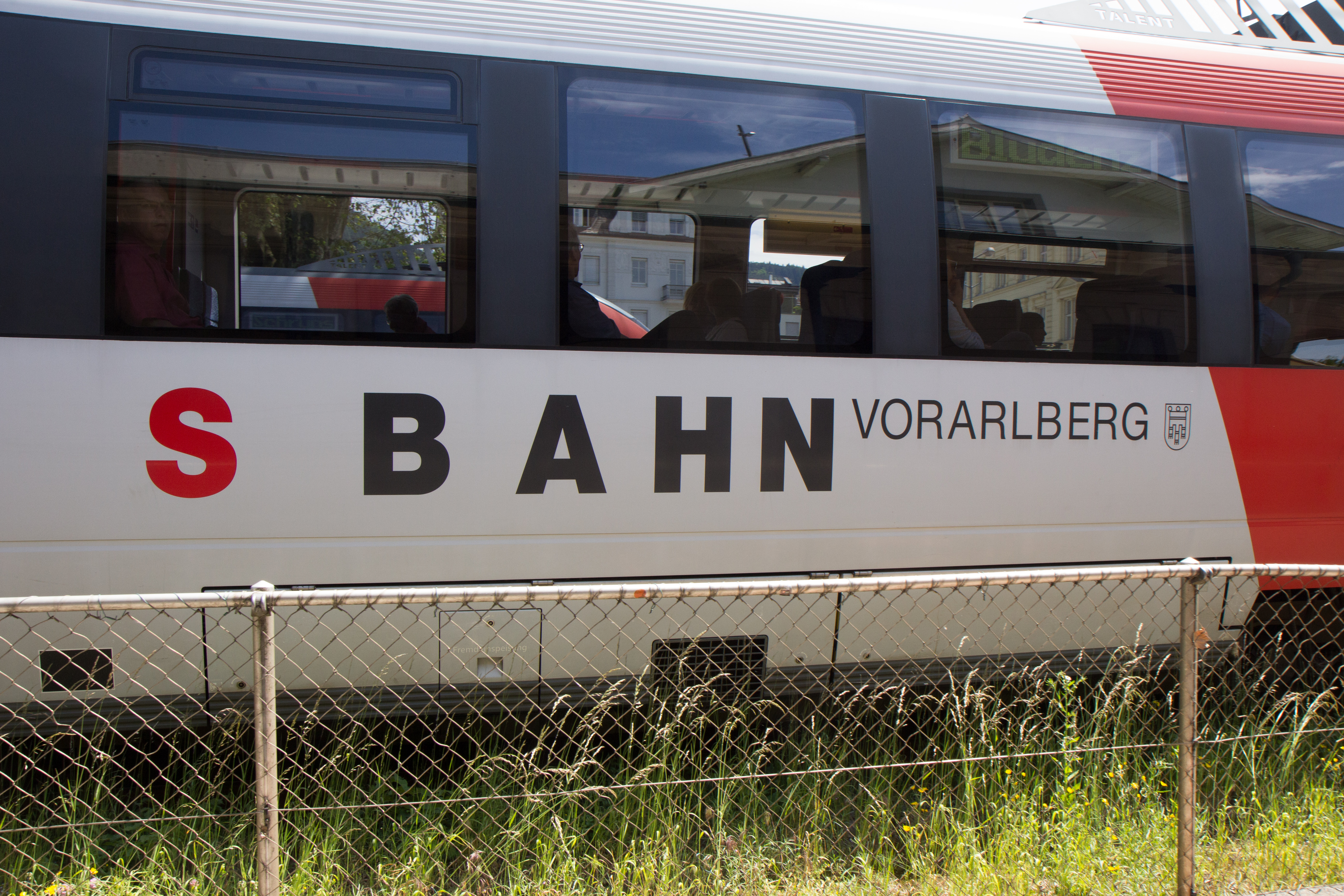 Bahnhof Bregenz Hafen